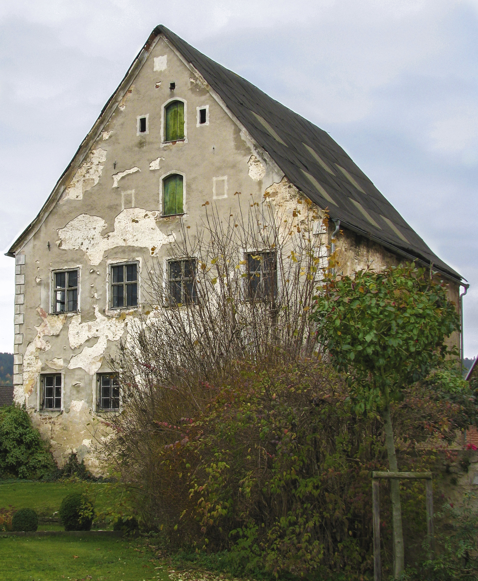 Erasbach, Ortsteil von Berching im Landkreis Neumarkt i. d. O., ehem. Weiherhaus Landsassengut